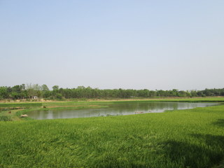 বইন্যদীঘি